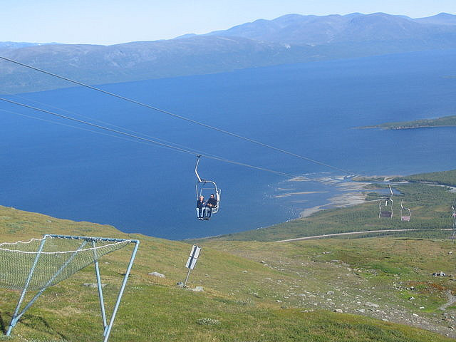 Abisko lift. The big lake is Torneträsk